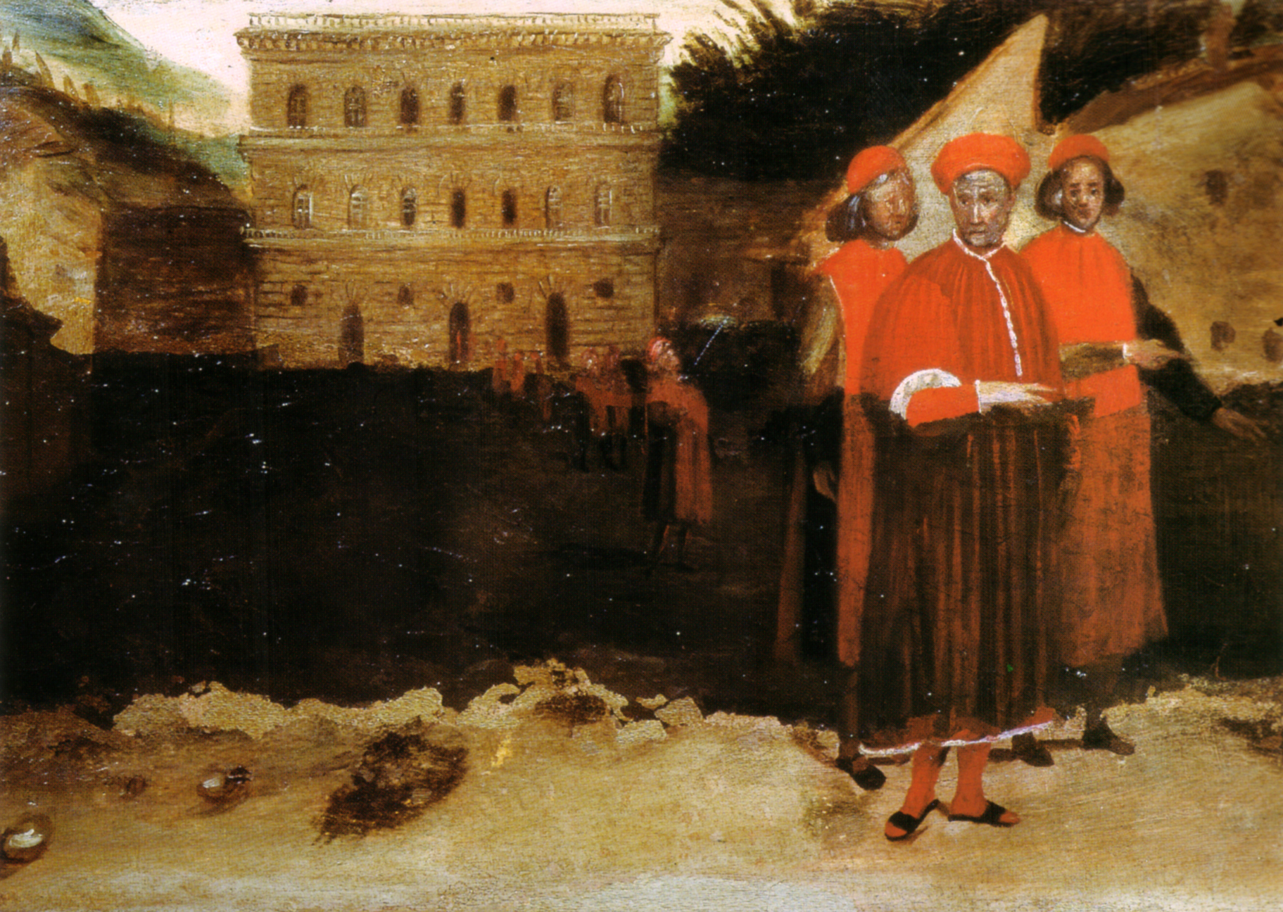 Santo Spirito a Firenze, cappella Pitti, predella con Luca Pitti e Palazzo Pitti, opera di Alessandro Allori.